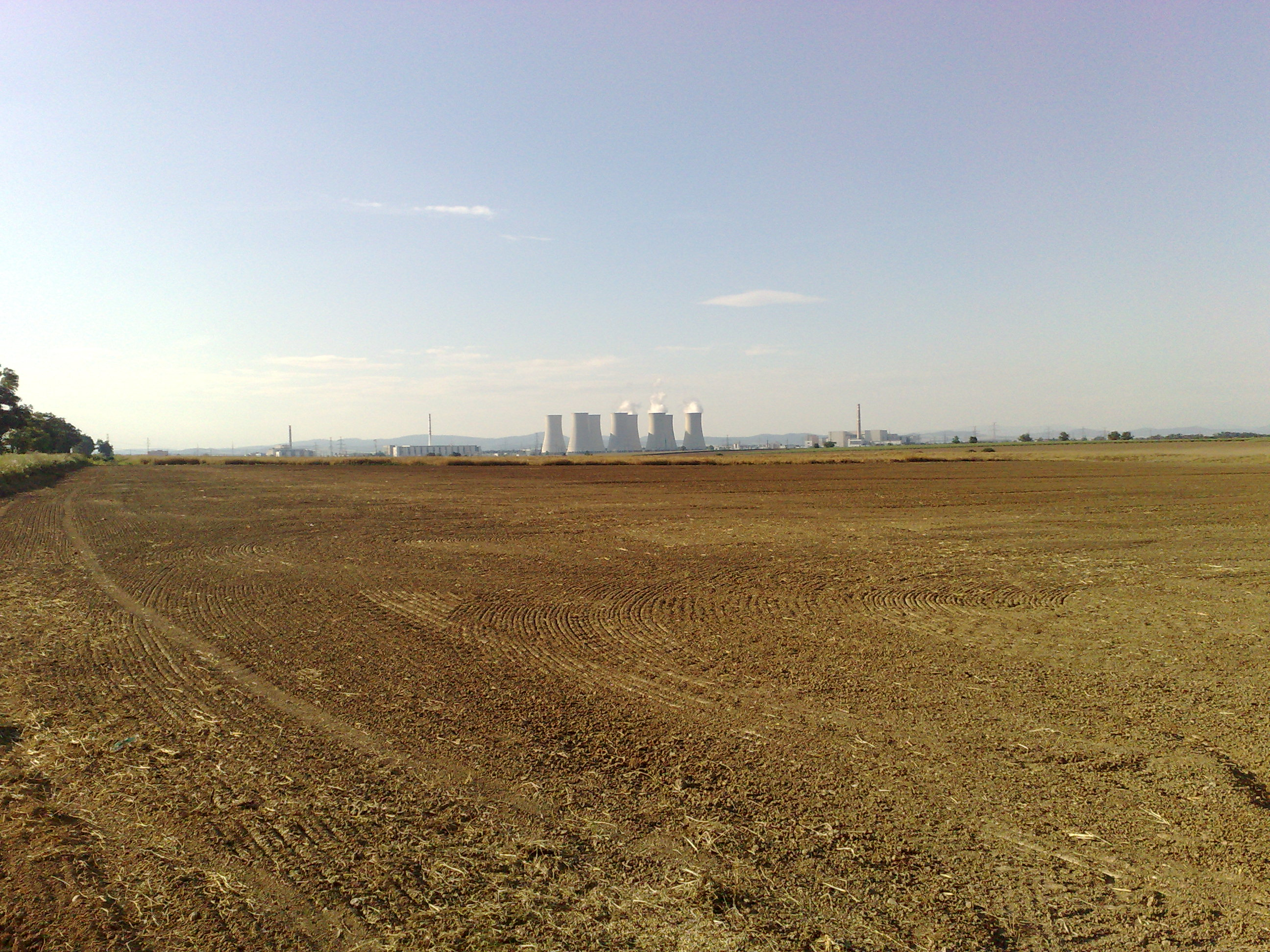 920 42 Žlkovce, Slovakia